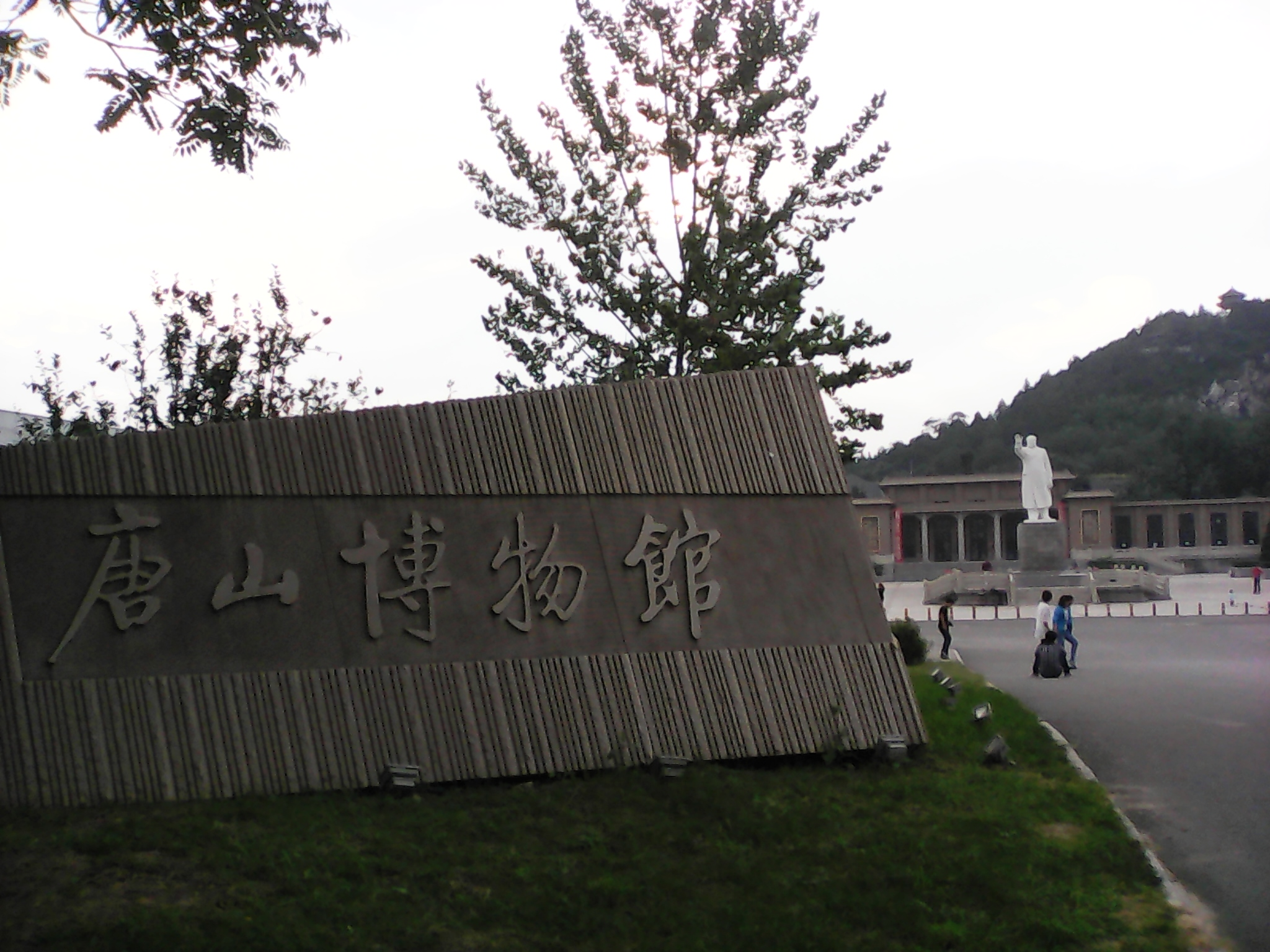 中文（中国大陆）: 唐山博物馆入口